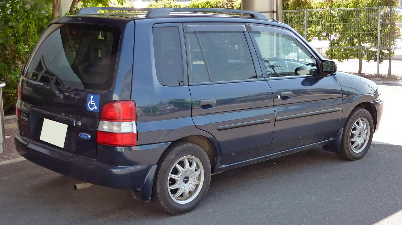 フォード・フェスティバミニワゴン